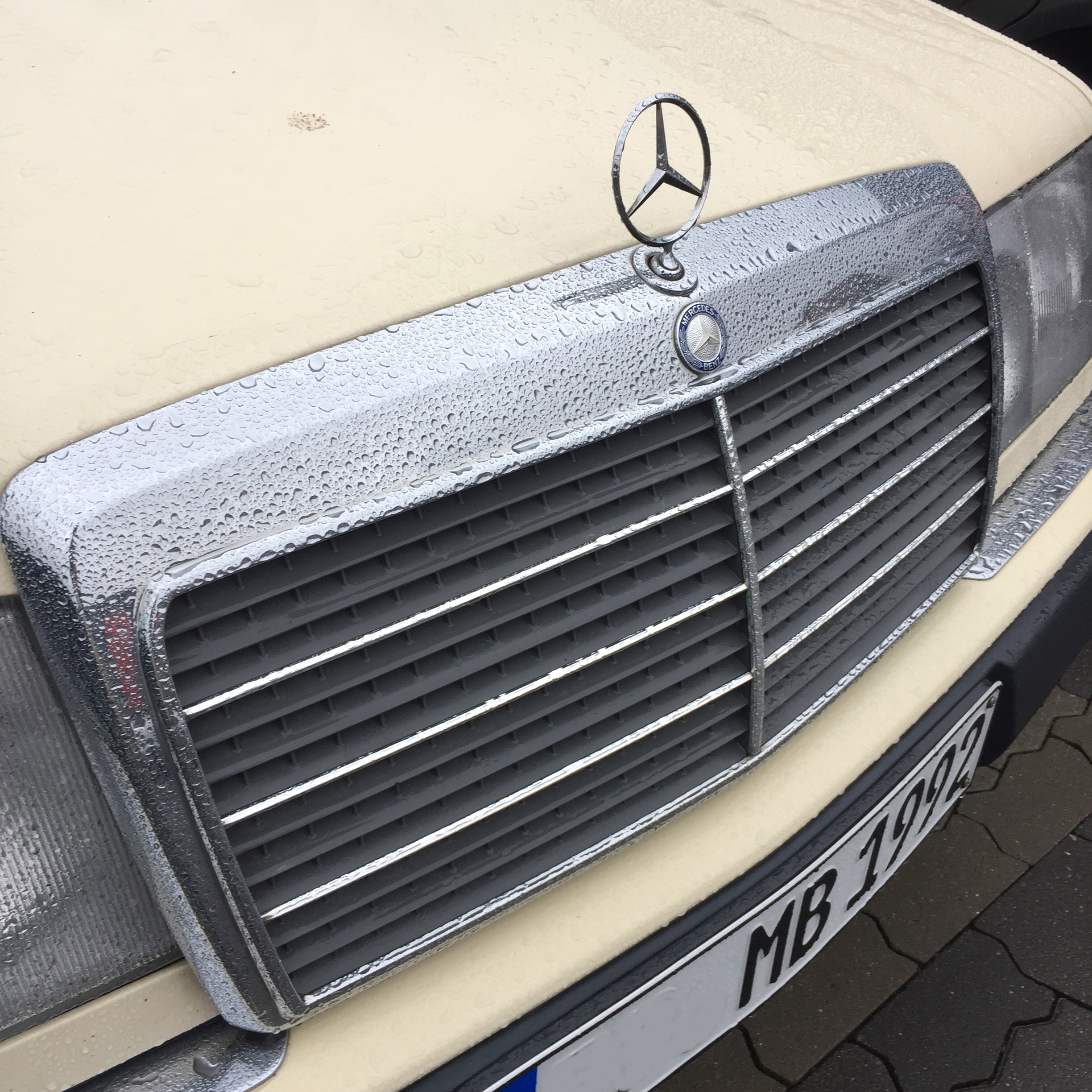 Mercedes-Stern (W124 1992)